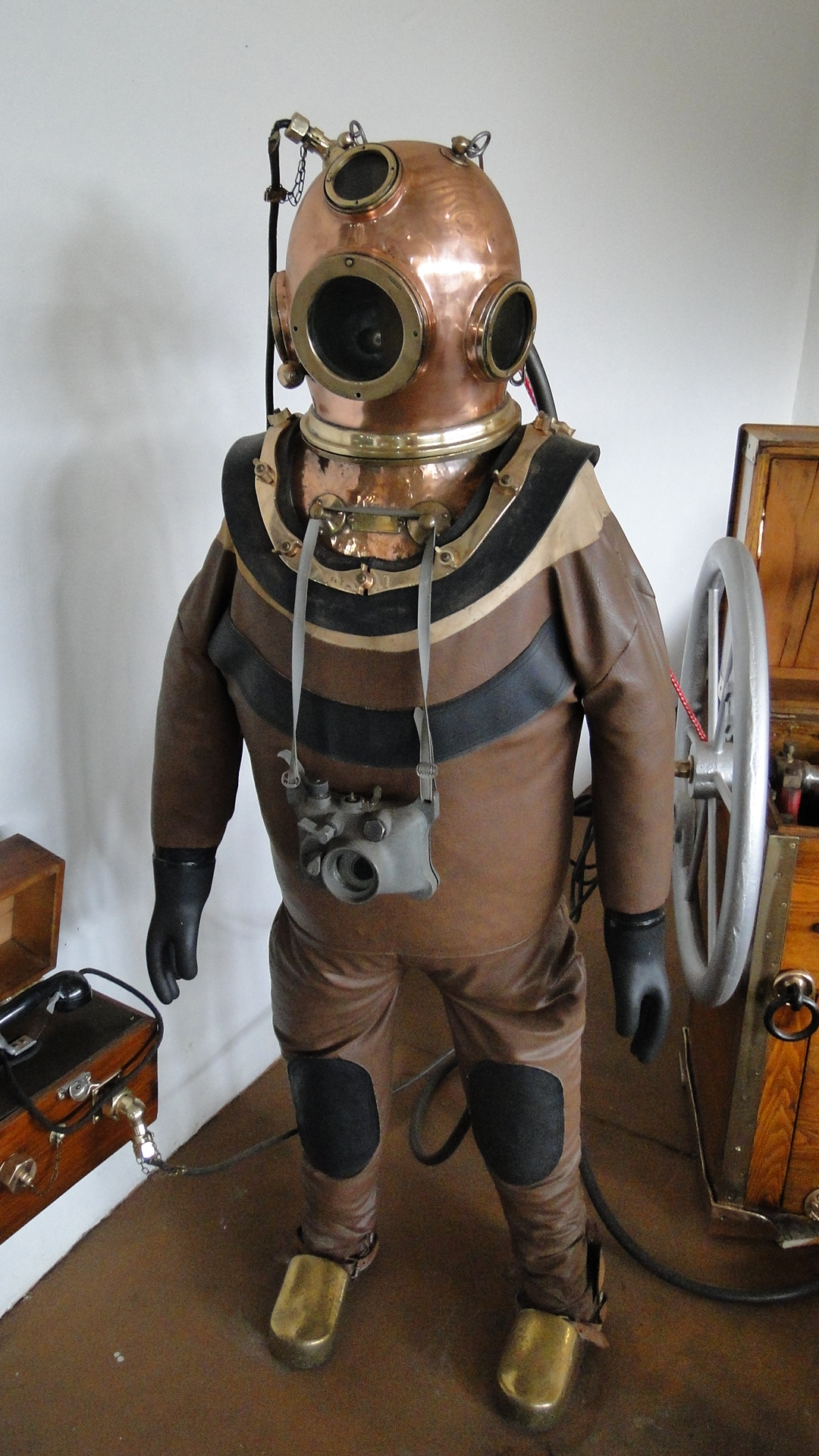 Equipamento completo de escafandrista. Museu Eduardo André Matarazzo, Bebedouro, São Paulo, BRasil.